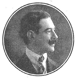 Retrato de Artemio del Valle Arizpe, publicado en la revista española Nuevo Mundo.